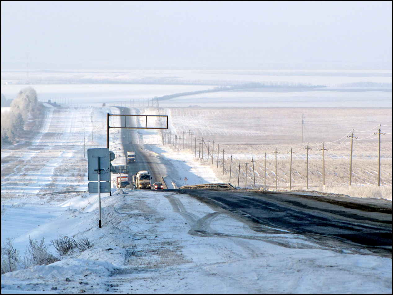 М5 в районе поворота на Камышлу